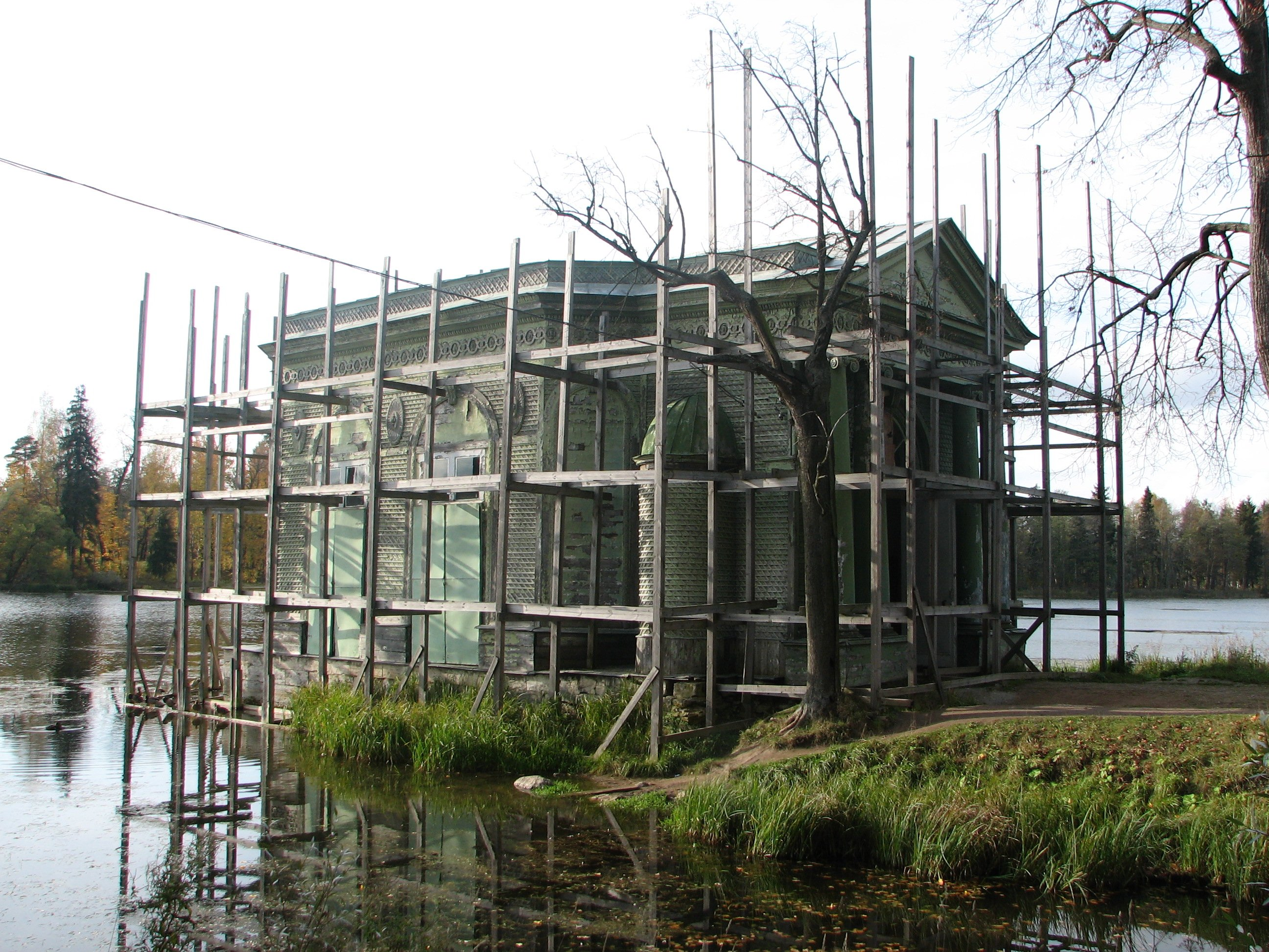 Павильон Венеры в Дворцовом парке Гатчины